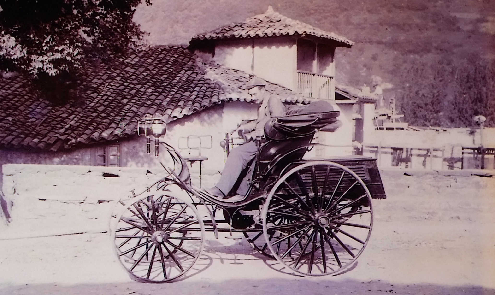 José Revilla Haya en su Benz, el primero que hubo en España, modelo Victoria en la década de 1890